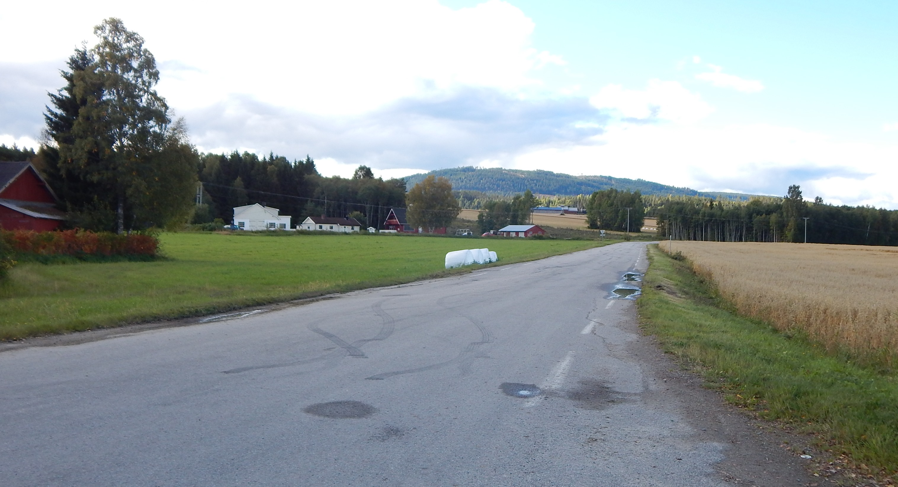 Østenden av Hukusjøvegen (fylkesvei 412) like ved fylkesvei 210